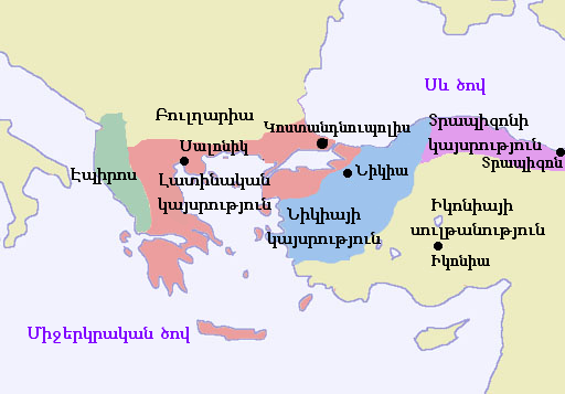 Բյուզանդական կայսրությունը Չորրորդ խաչակրաց արշավանքից հետո